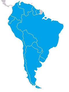 Países que pertencem à Confederação Sul-Americana de Natação.